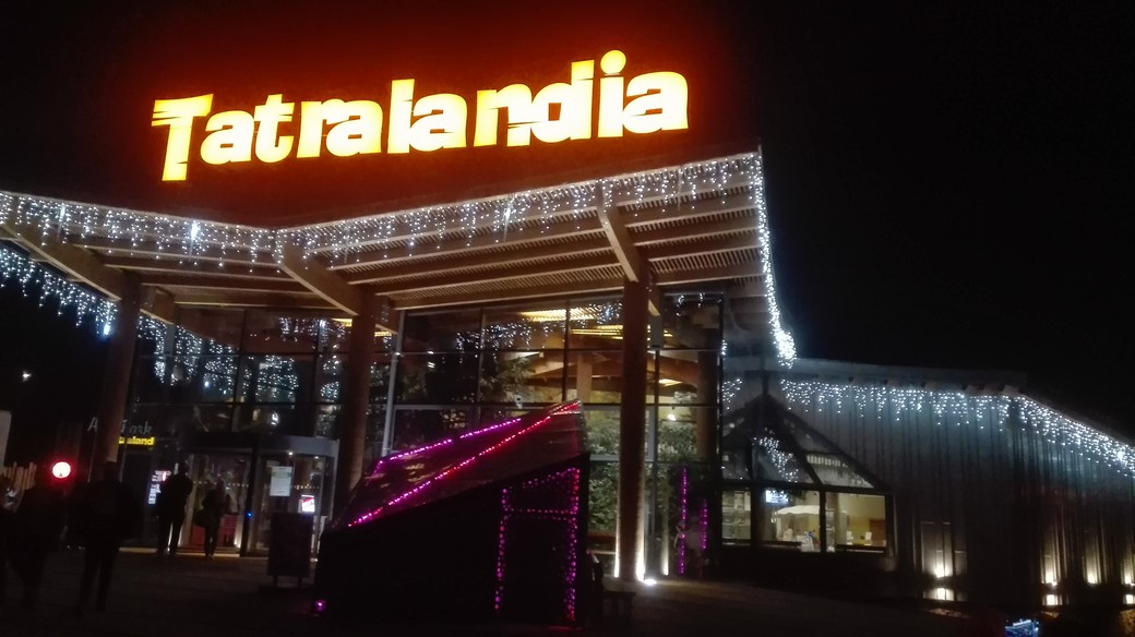 Večerné osvetlenie vstupu